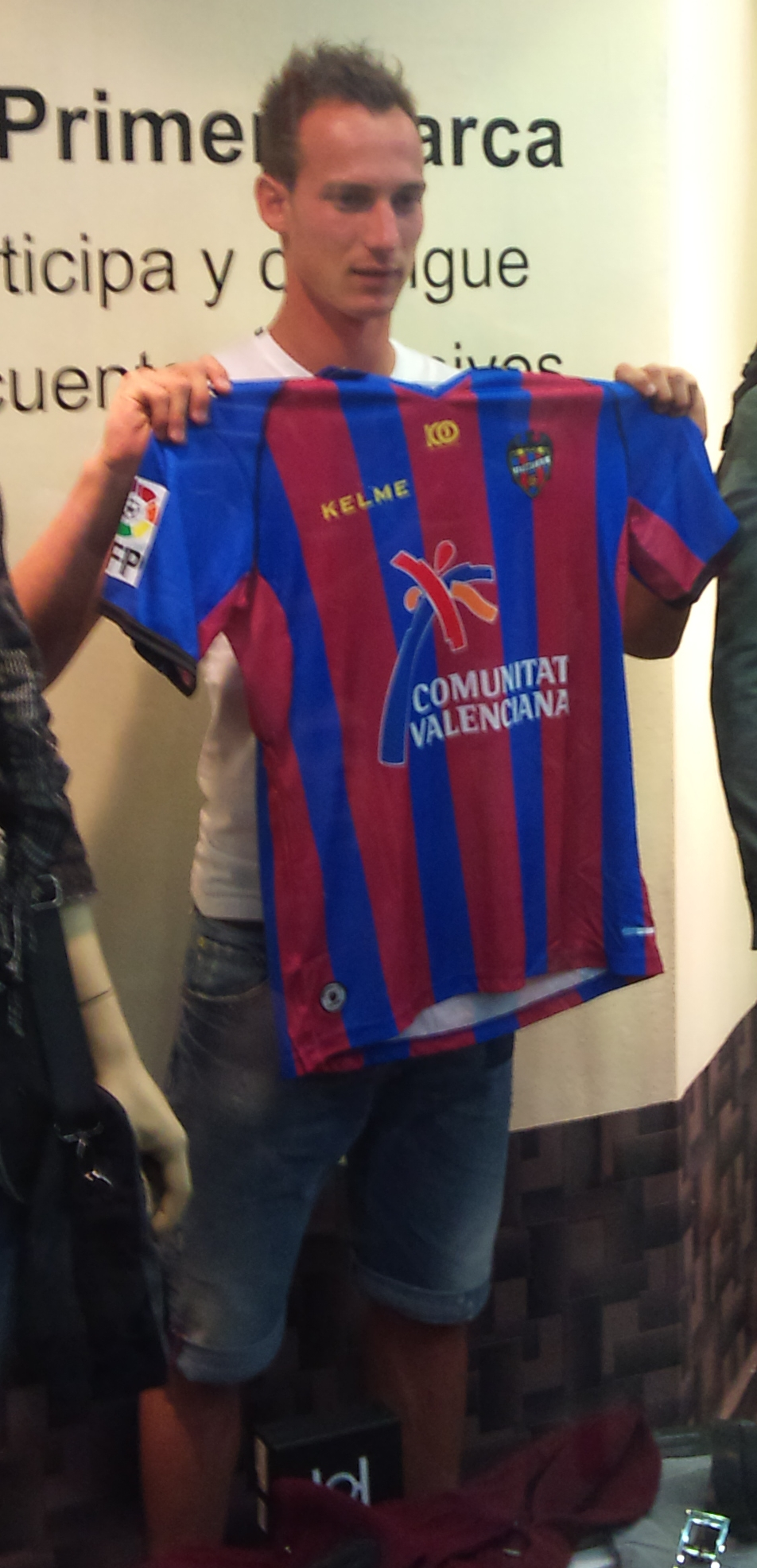 El jugador italià Massimo Volta, el dia de la seua presentació com a membre de l'equip granota, d'on arribava cedit per la Sampdoria.